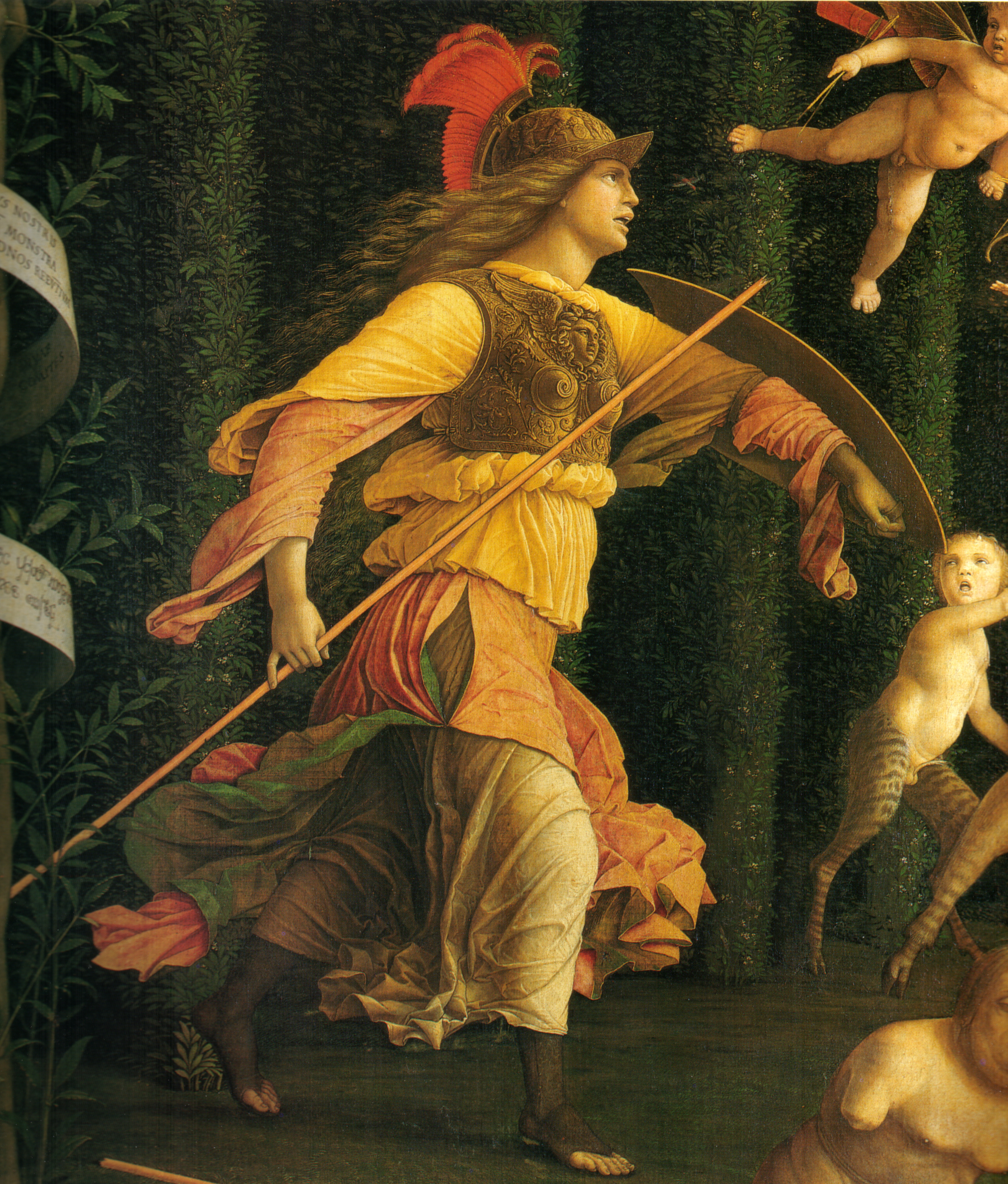 detail